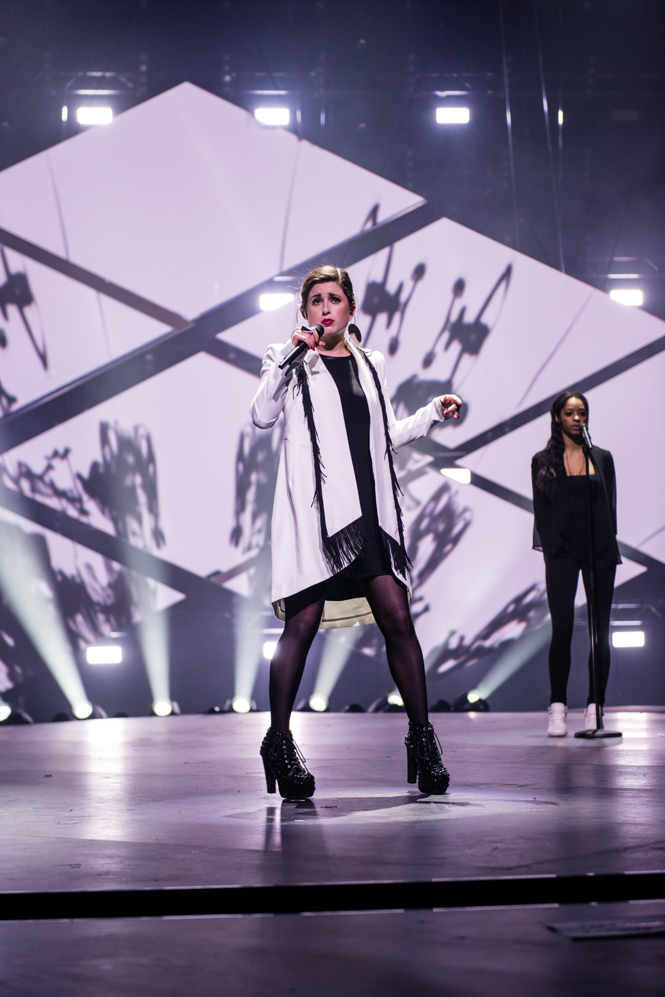 'Eurovision Song Contest 2015 - Unser Song für Österreich': 'Ann Sophie'